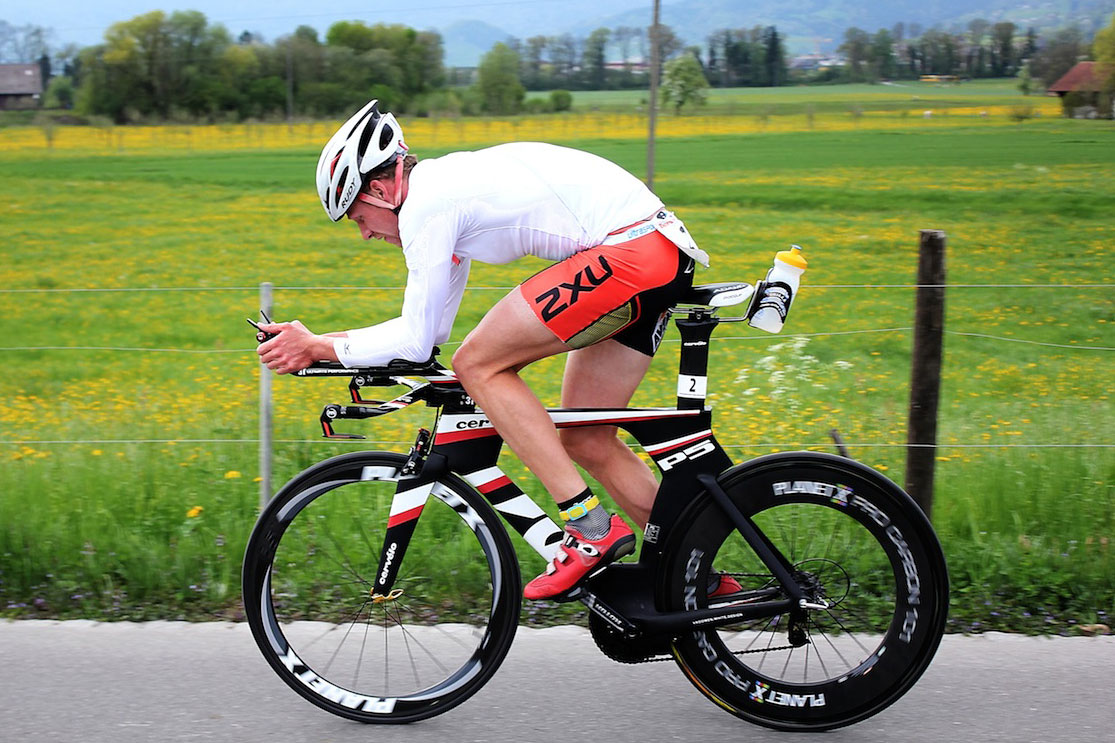 Per Bittner beim Rheintal Duathlon (2013)